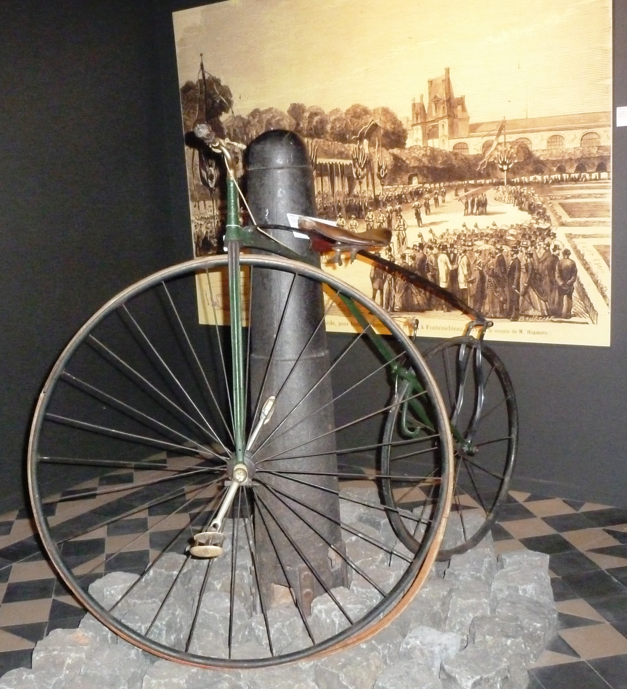 Michaux-Rad, ca. 1870, gebaut von Eugène Meyer, Wielermuseum in Roeselare, Belgien